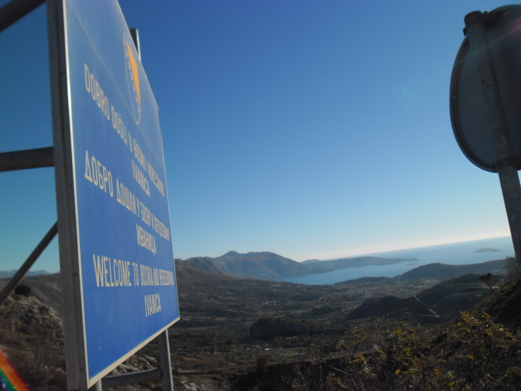 granica Hrvatske i BiH na Ivanici kraj Dubrovnika